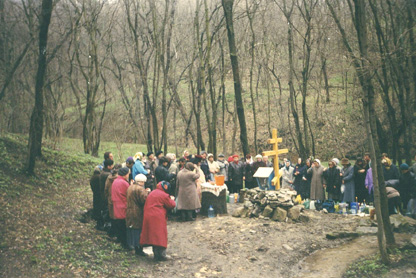 Holy place in Kiseleva balka (Ukraine)